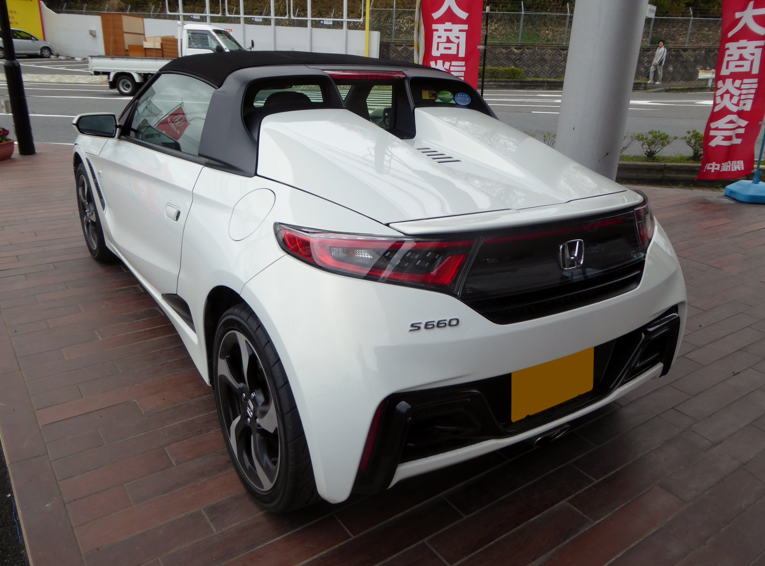 JW5型ホンダ・S660 αをリアから撮影。